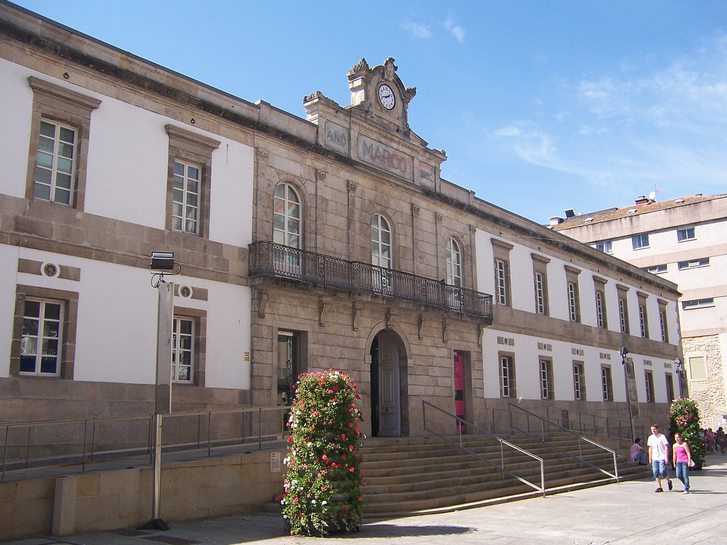 Entrada al museo MARCO de Vigo.